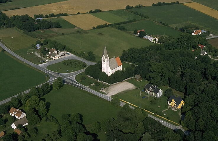 Motiv: Ekeby kyrka Nyckelord: Flygbilder, Riksintressen Kategori: Kyrkomiljö Ekeby kyrka